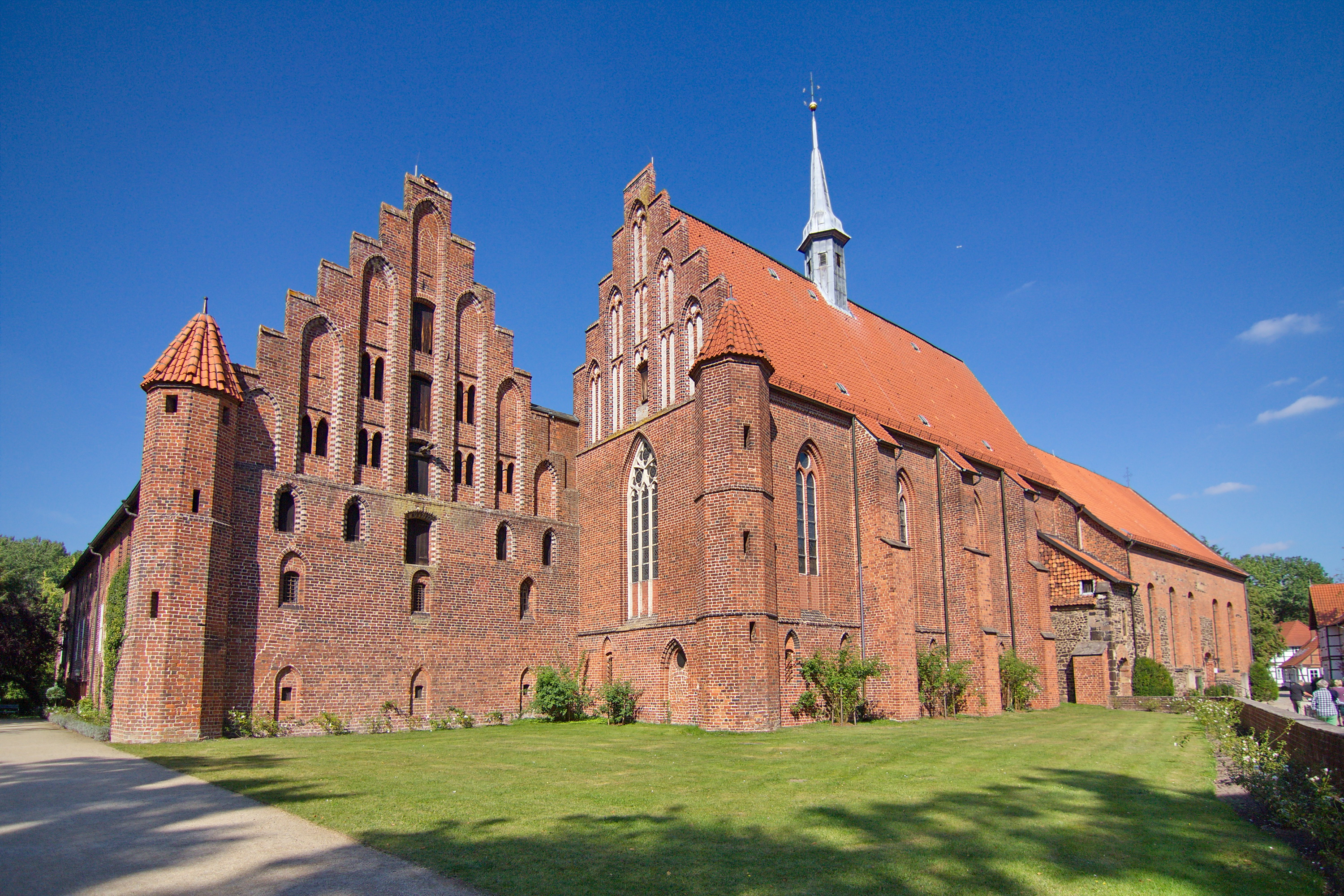 Das Kloster Wienhausen ist ein ehemals zisterziensisches, heute evangelisches Frauenkloster aus dem 13. Jahrhundert. Es liegt im niedersächsischen Wienhausen und wird von der Klosterkammer Hannover verwaltet.